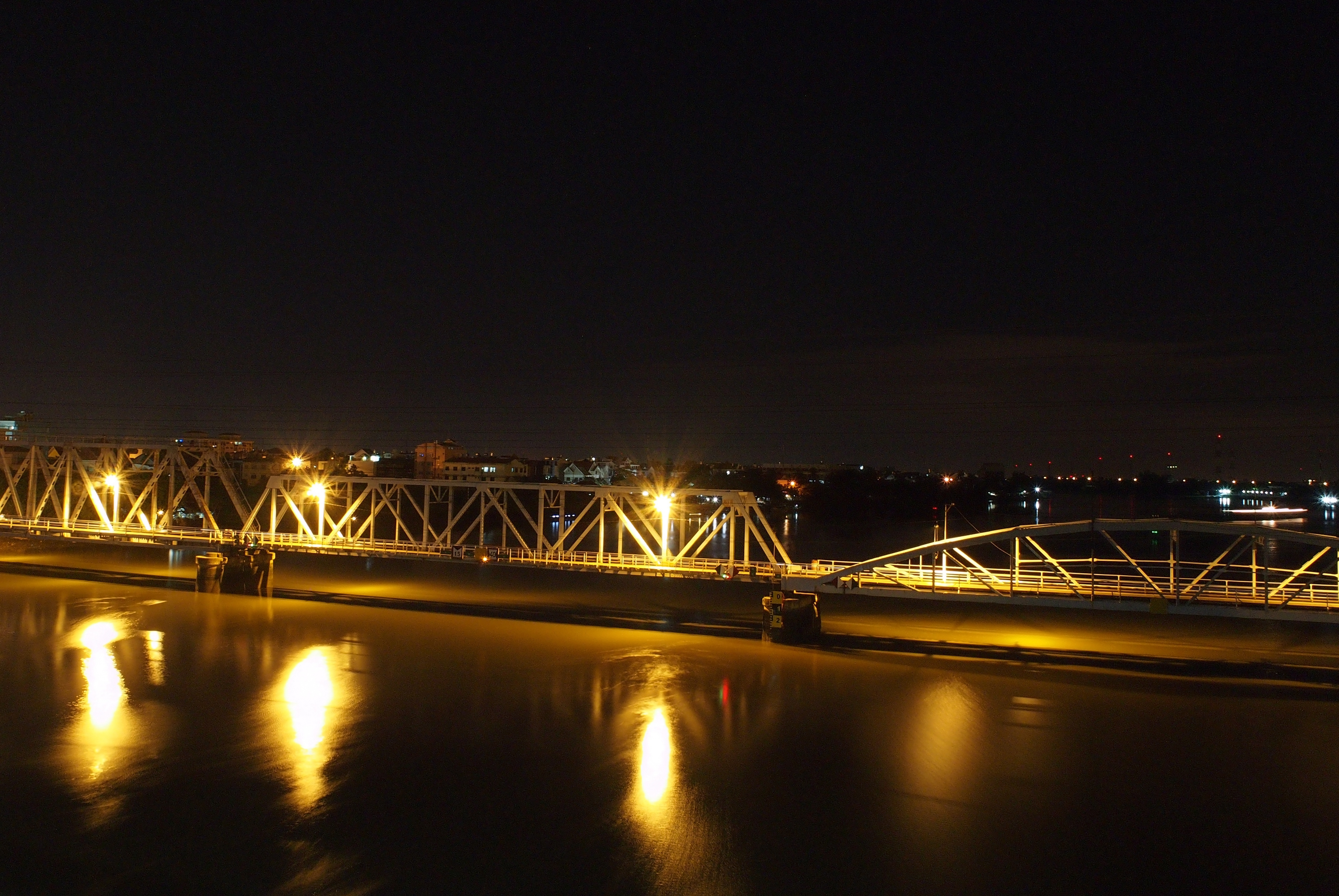 Toàn cảnh cầu sắt Bình Lợi về đêm Hình thuộc phạm vi công cộng vì tôi tạo ra và tôi hiến tặng cho wiki và không giữ bất kỳ bản quyền nào